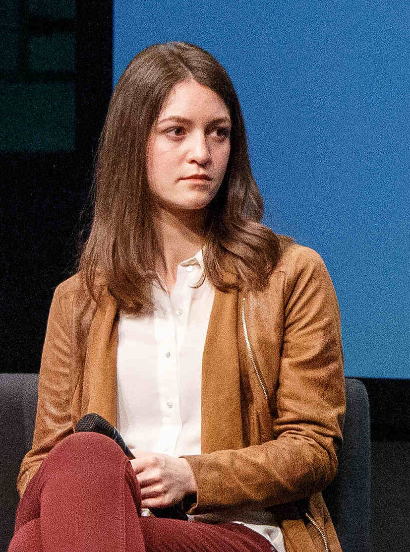 03.05.2018, Berlin: Discussion: Rechtsruck in Deutschland - Linksabbiegen (un)möglich? Speaker: Johannes Hillje, Elisabeth Wehling, Marco Bülow, Julia Ebner. Die re:publica ist eine der weltweit wichtigsten Konferenzen zu den Themen der digitalen Gesellschaft und findet in diesem Jahr vom 02. bis 04. Mai in der STATION-Berlin statt. Foto: Jan Michalko/re:publica